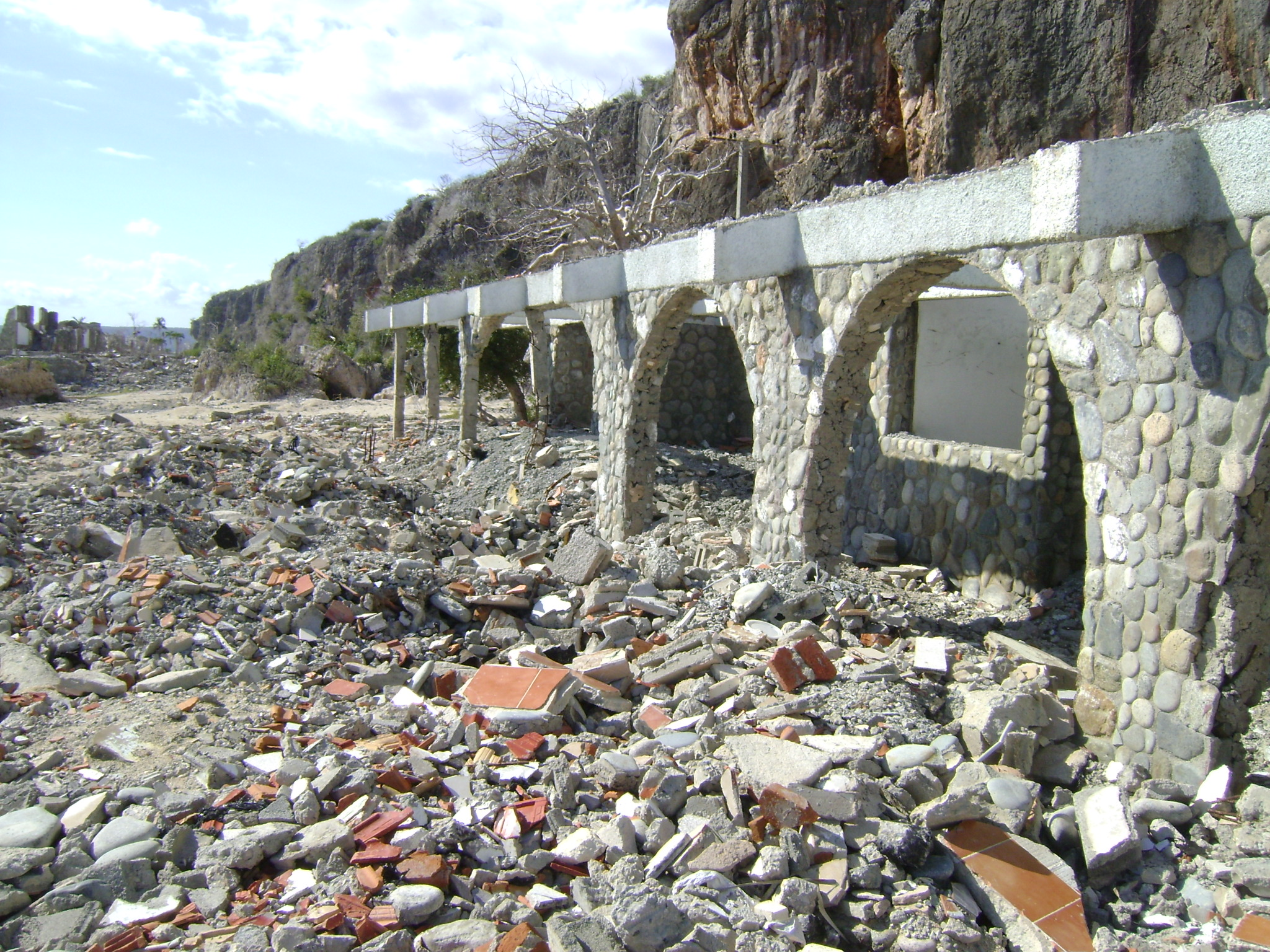 Les dommages causées par l'ouragan Sandy. Photos prises le 4 mars 2014.